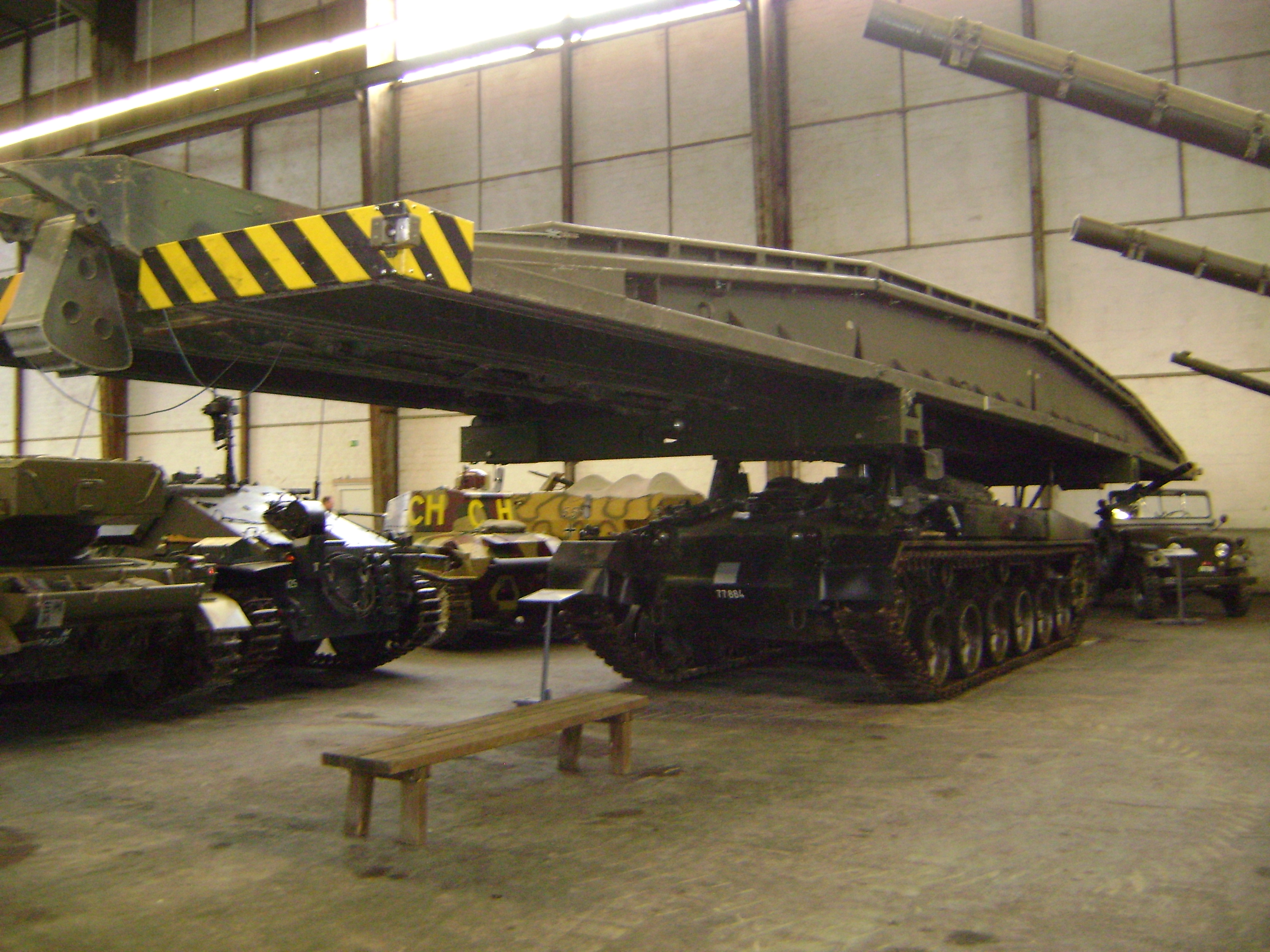 Brückenpanzer68